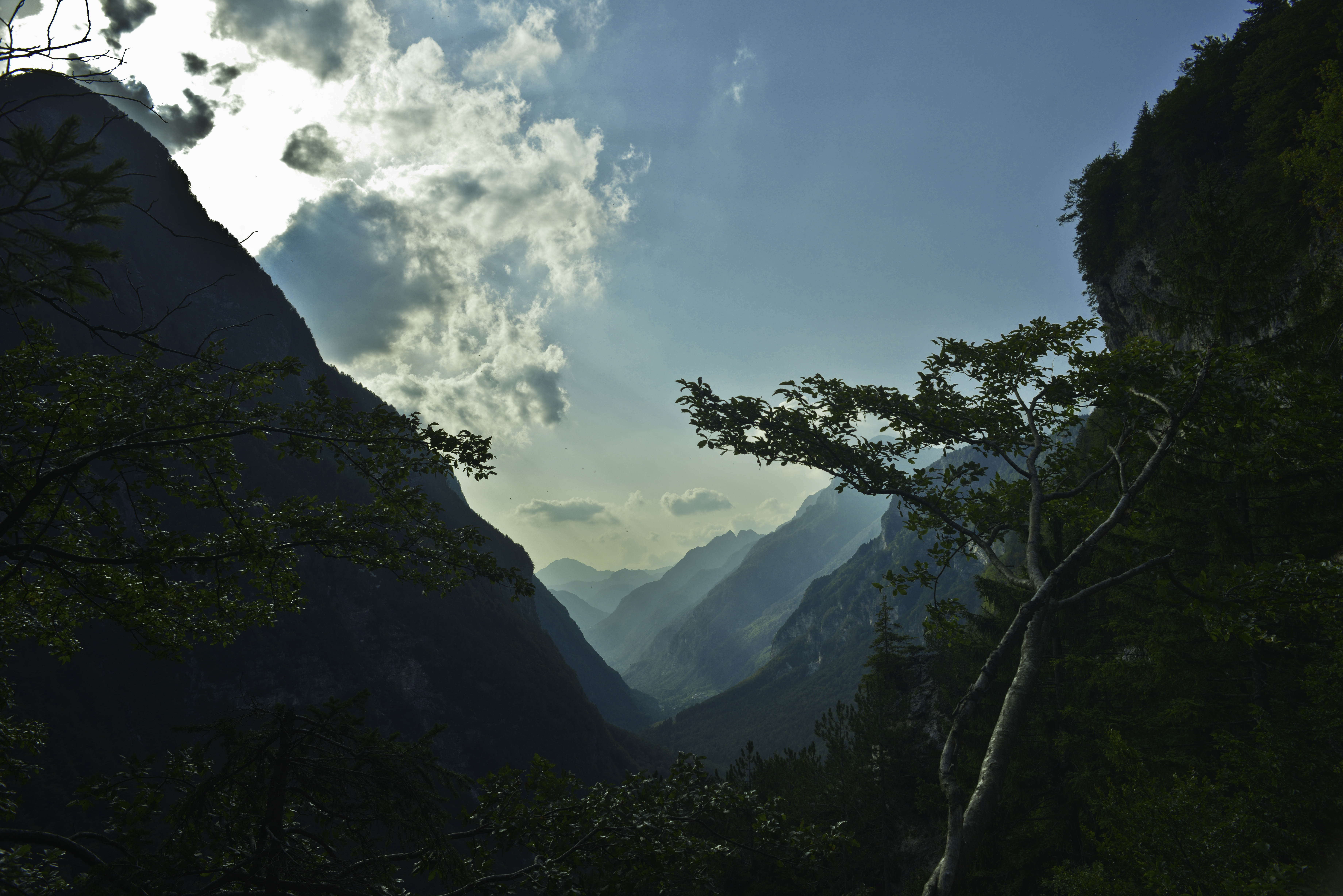 La val Raccolana